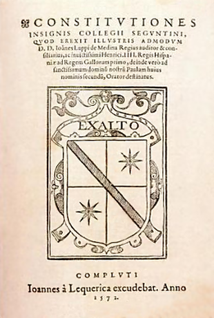 Constituciones de la Universidad de Sigüenza. Alcalá de Henares: Juan Íñiguez de Lequerica; 1572.